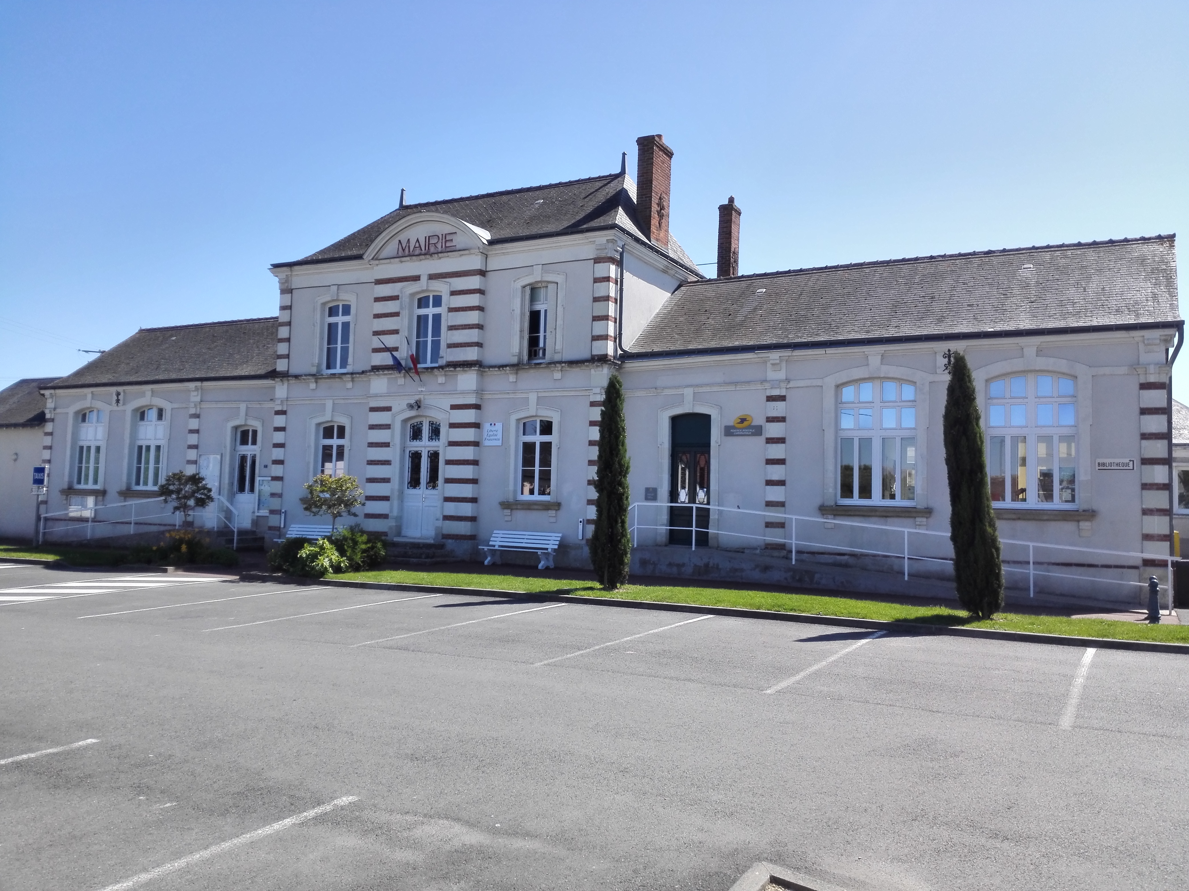 Mairie de Druye, Indre-et-Loire, France